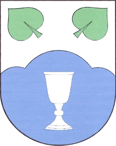 znak, Daňkovice, okres Žďár nad Sázavou